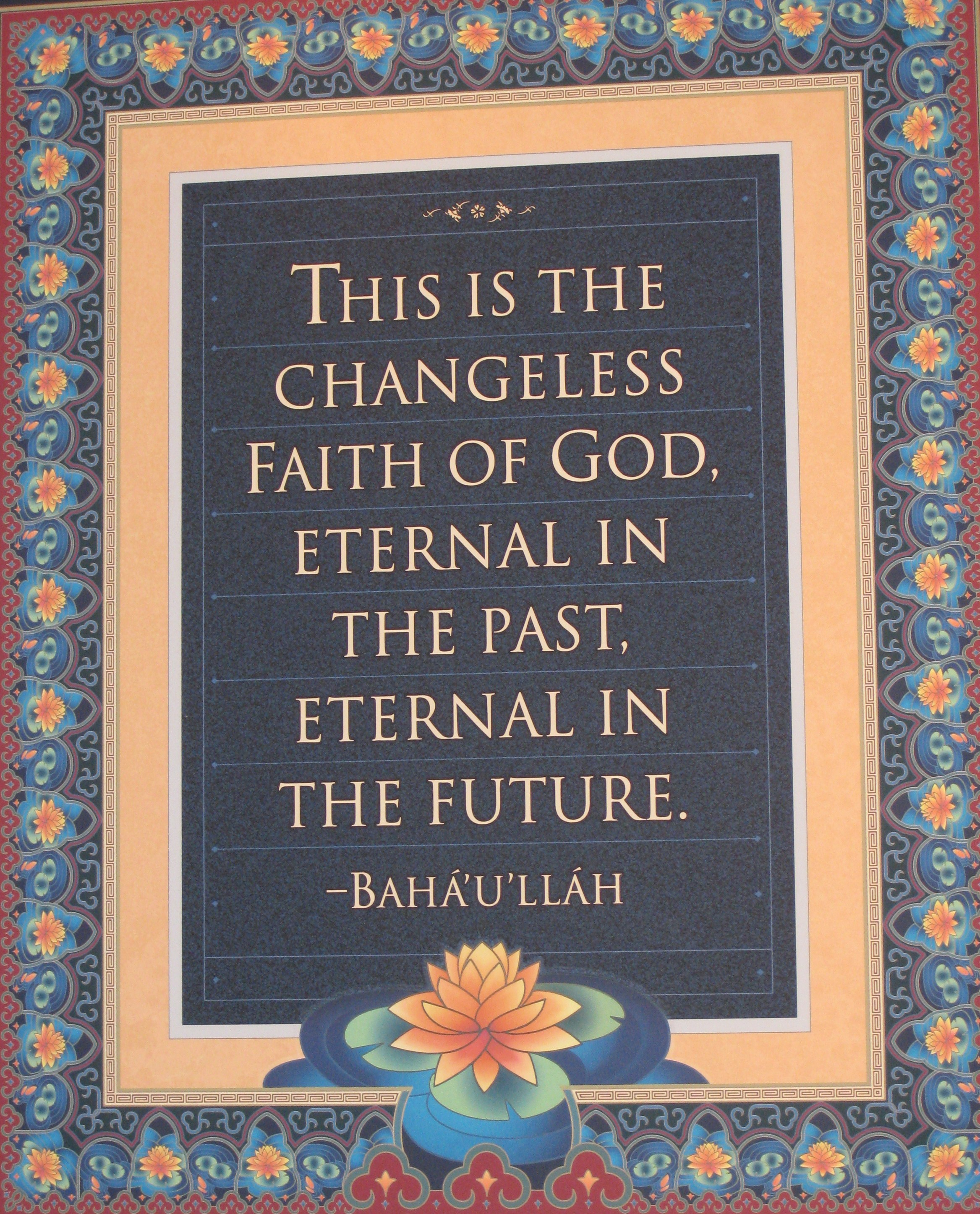 Bahai Texts טקסטים בהאיים במרכז המבקרים שבגנים הבהאיים בחיפה